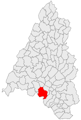 Categorie:Hărţi ale judeţului Bihor